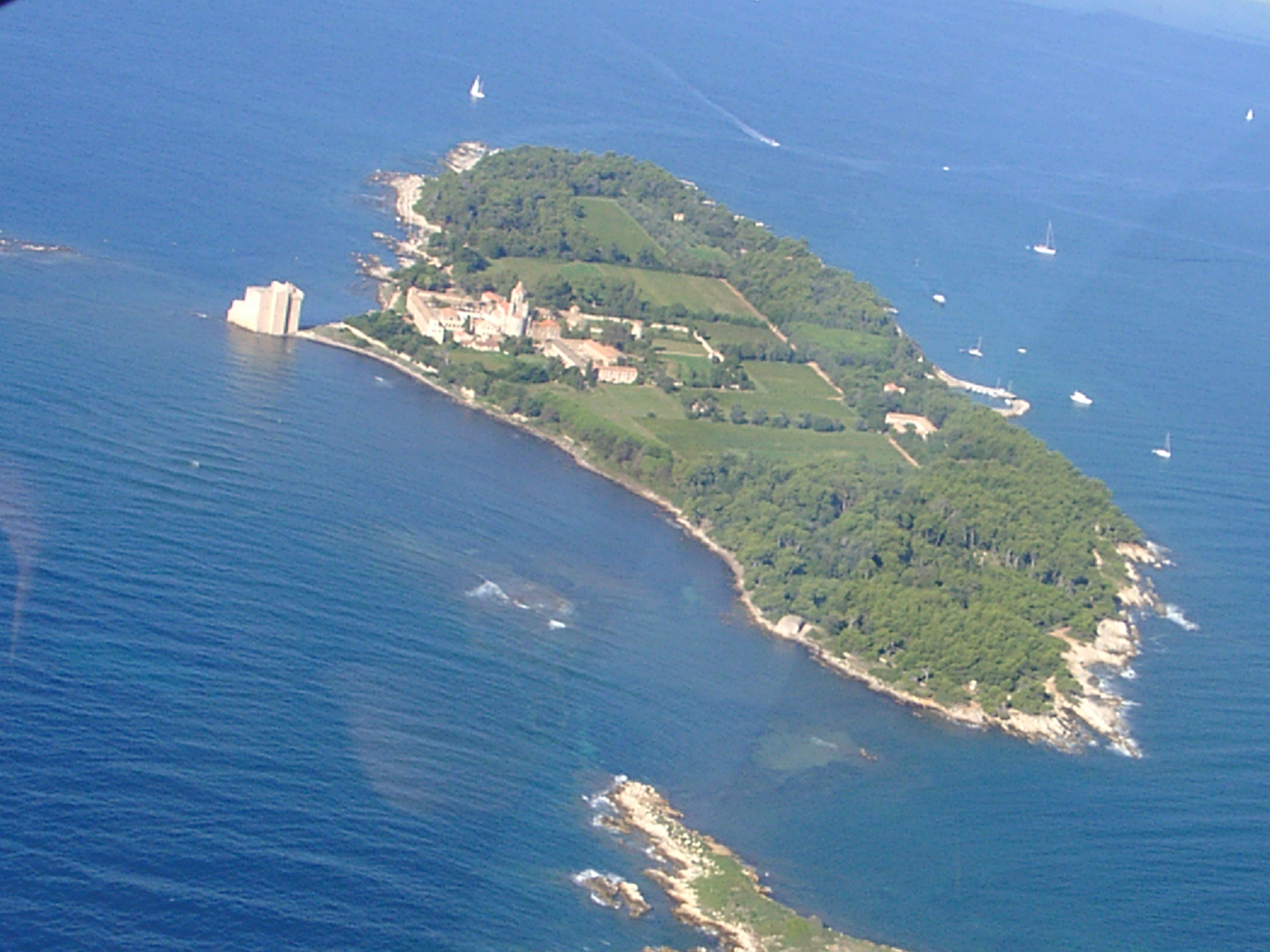 Ile de Saint-Honorat vue d'avion